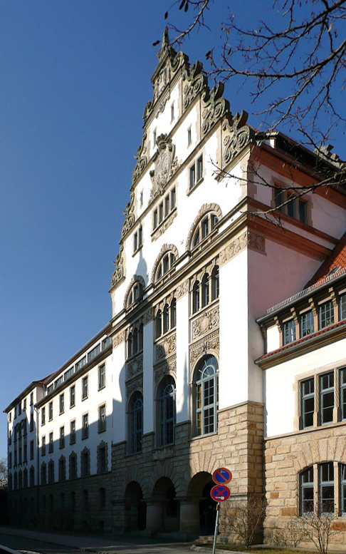 Hannover Hardenbergstraße 3-4, Altbau der Oberfinanzdirektion Hannover, errichtet 1905 für die preußische Oberzolldirektion Hannover, ab 1919 Sitz des Landesfinanzamts bzw. des Oberfinanzpräsidenten Hannover.